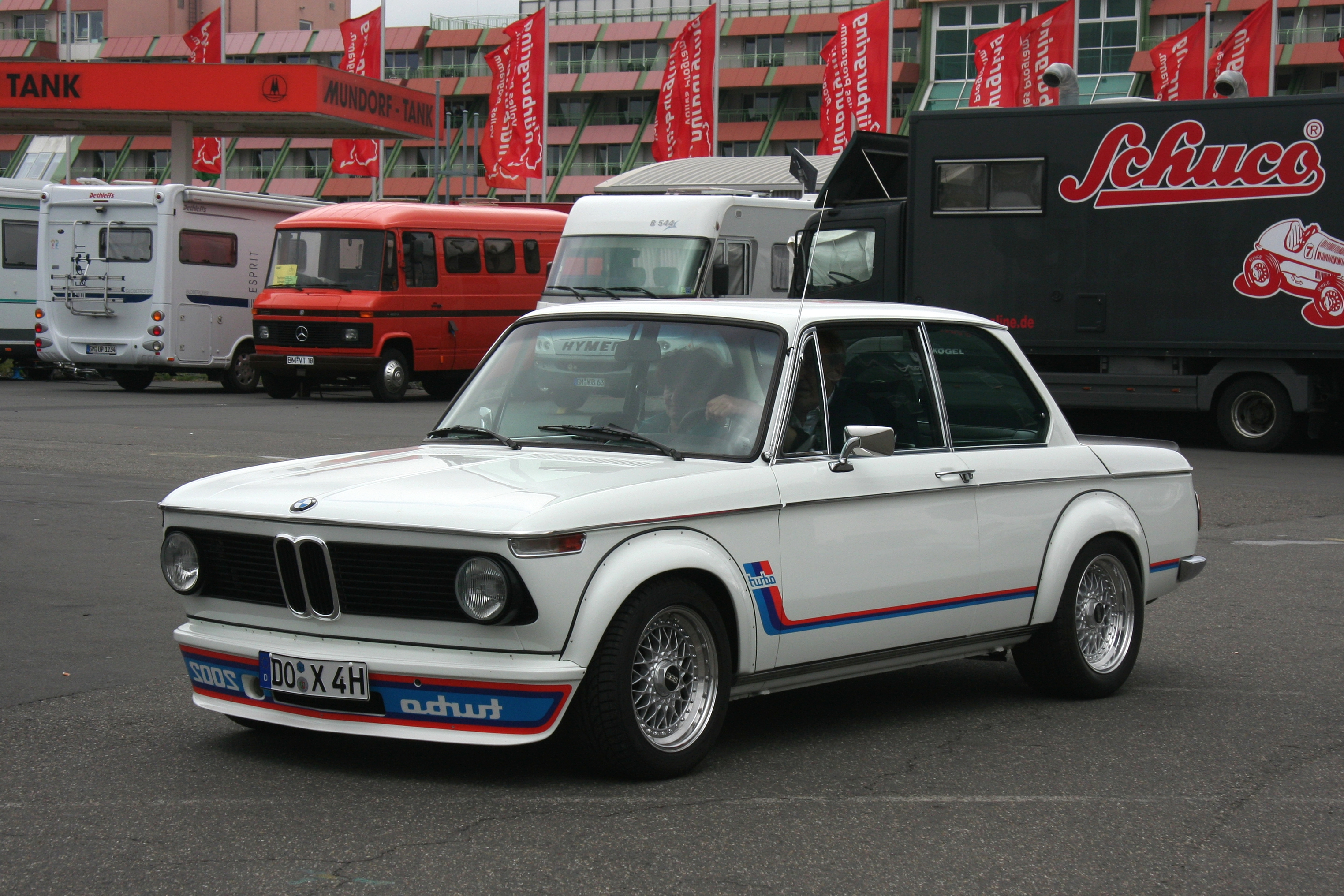 BMW 2002 Turbo